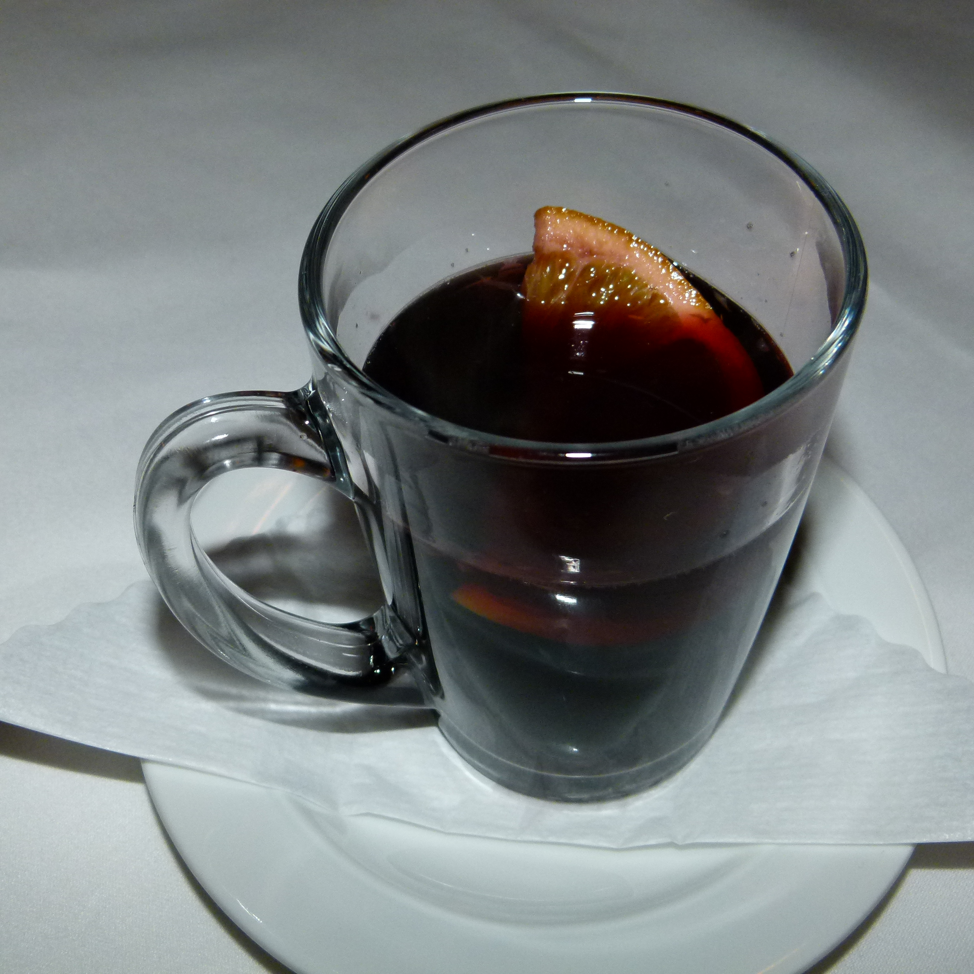 Glühwein auf der Basis von Rotwein, Restaurant "Elbterasse Wachwitz", Dresden